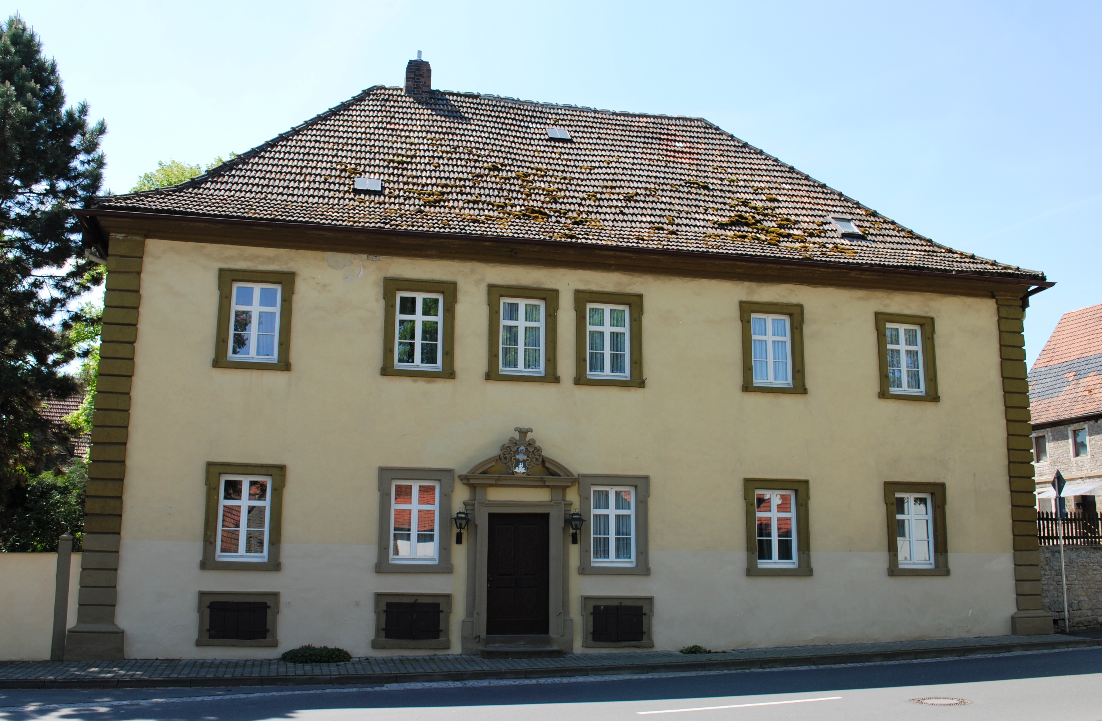 Schloss Schernau (auch Kleiner Adelspalais), Schlossstraße Schernau (Dettelbach).